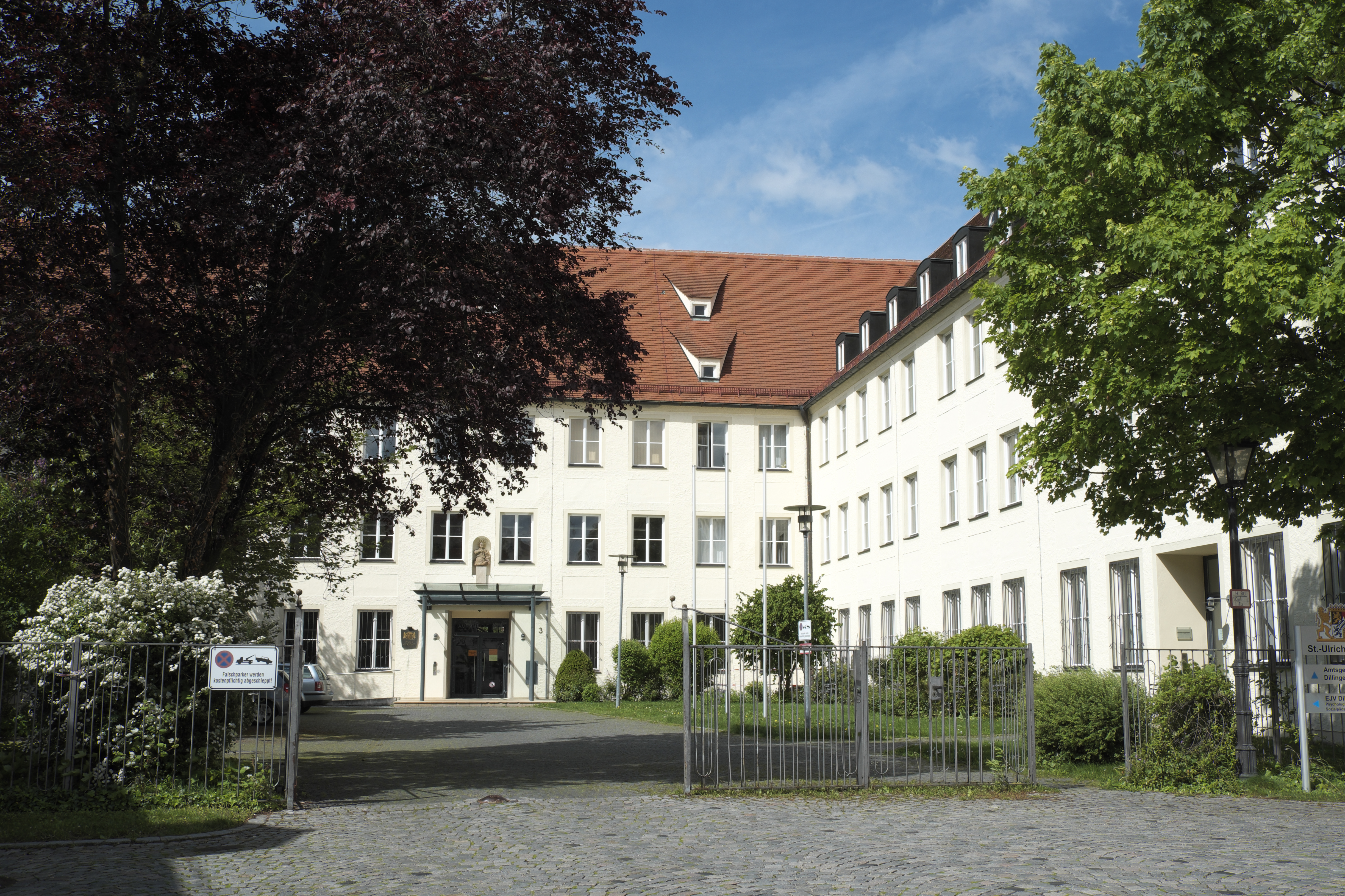 Amtsgericht am Ulrichsplatz in Dillingen an der Donau (Bayern), ehemaliges Studienseminar St. Ulrich